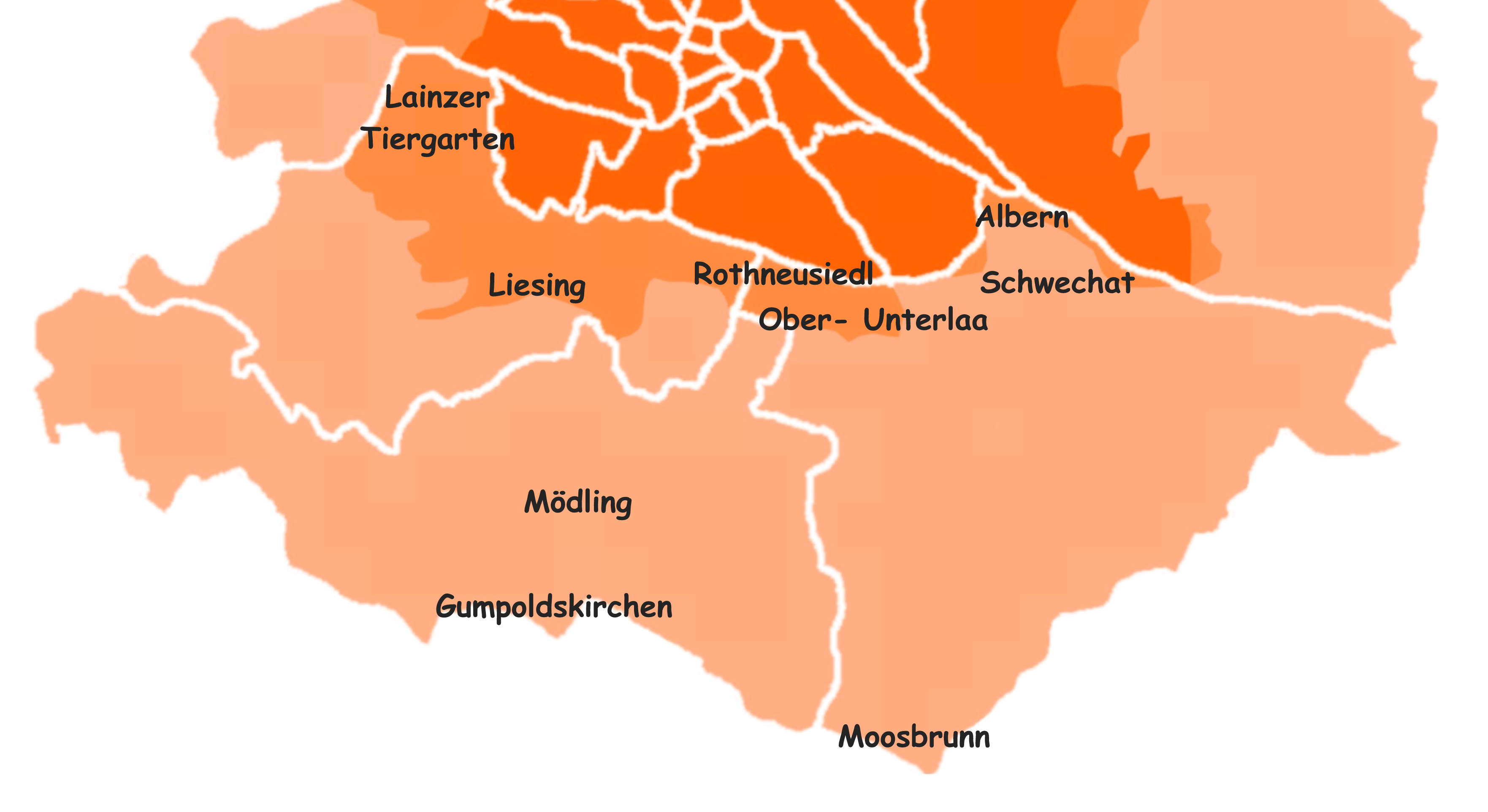 Karte von Groß-Wien (Detail)